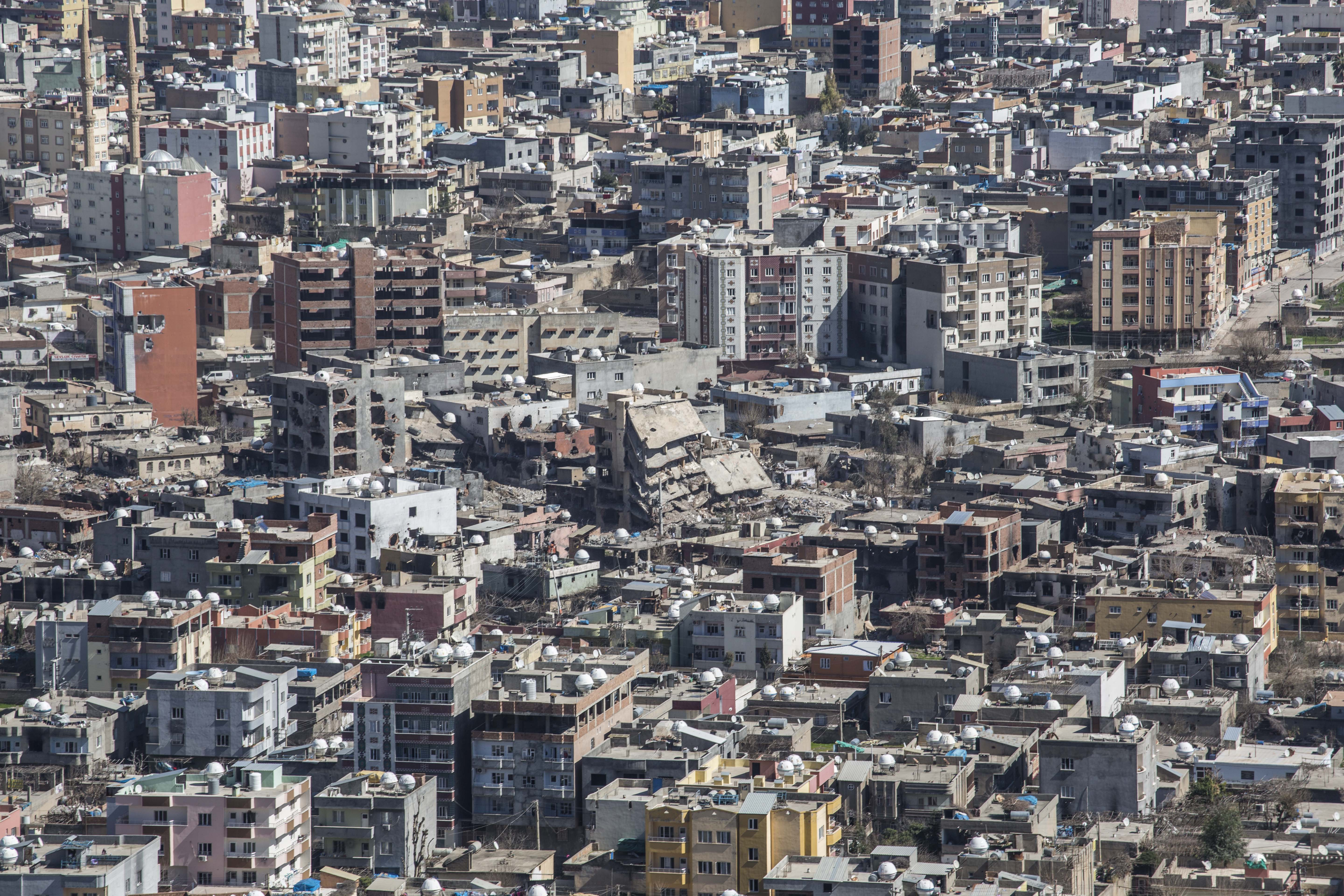 Cizre çatışmaları sırasında Cizre ilçesi, 2 Mart 2016